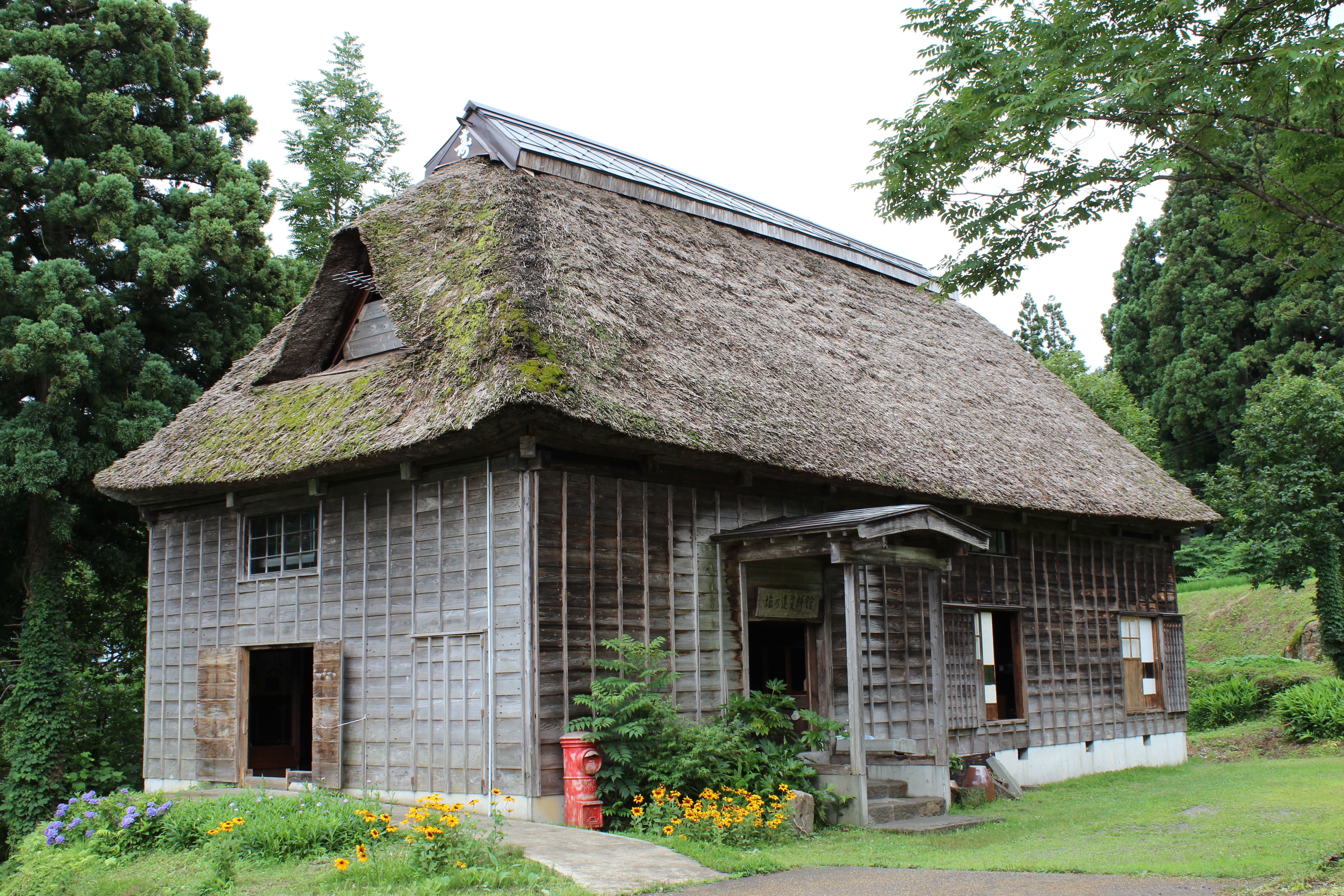 塩の道資料館。新潟県糸魚川市山口552。